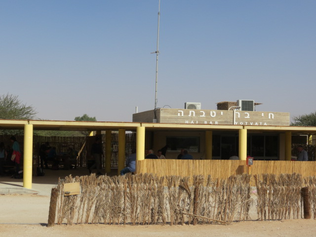 Hai Bar Yotvata Nature Reserve חי-בר יטבתה